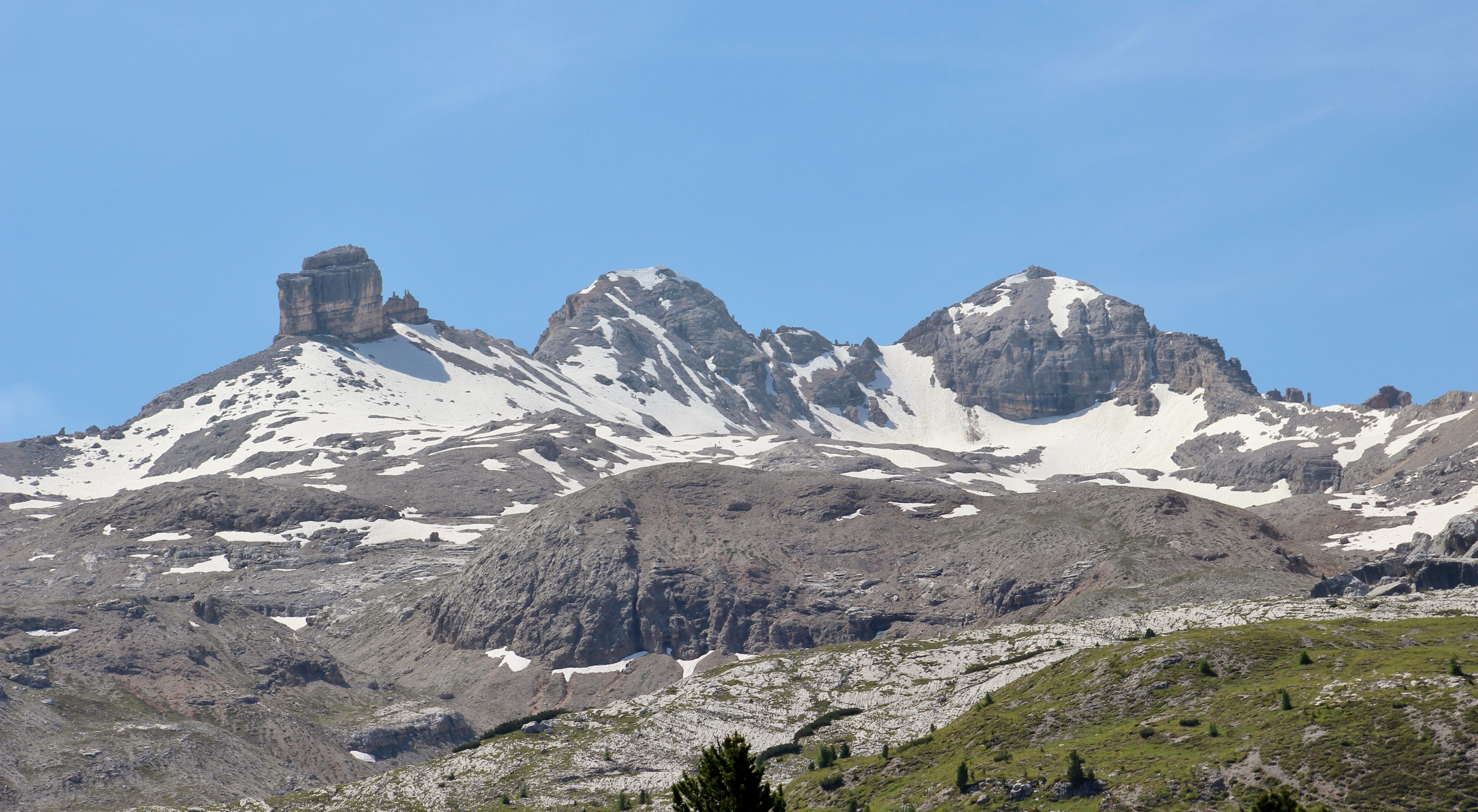 Monte Castello, Monte Casale, Monte Cavallo von Norden aus gesehen